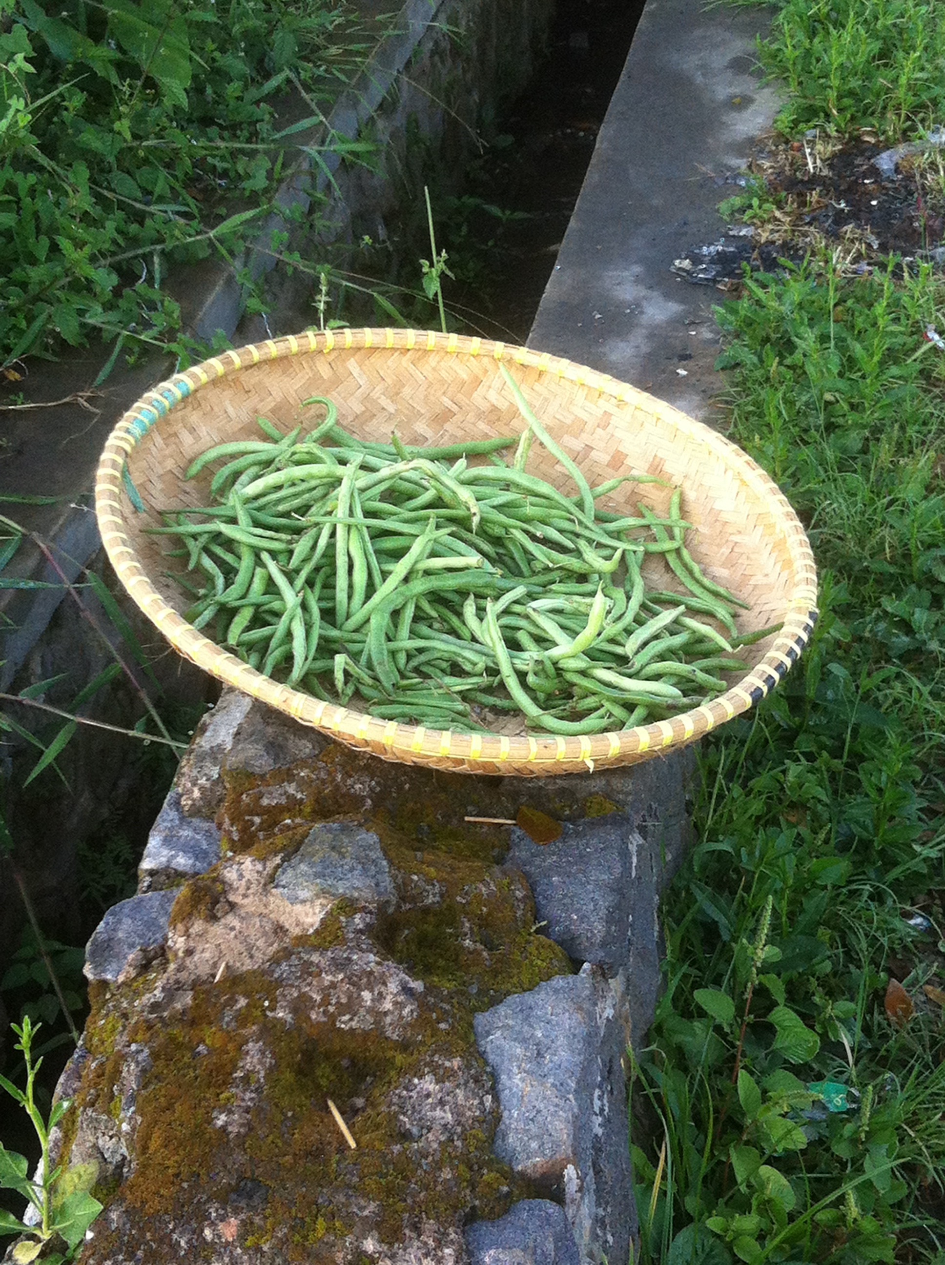 Tampah